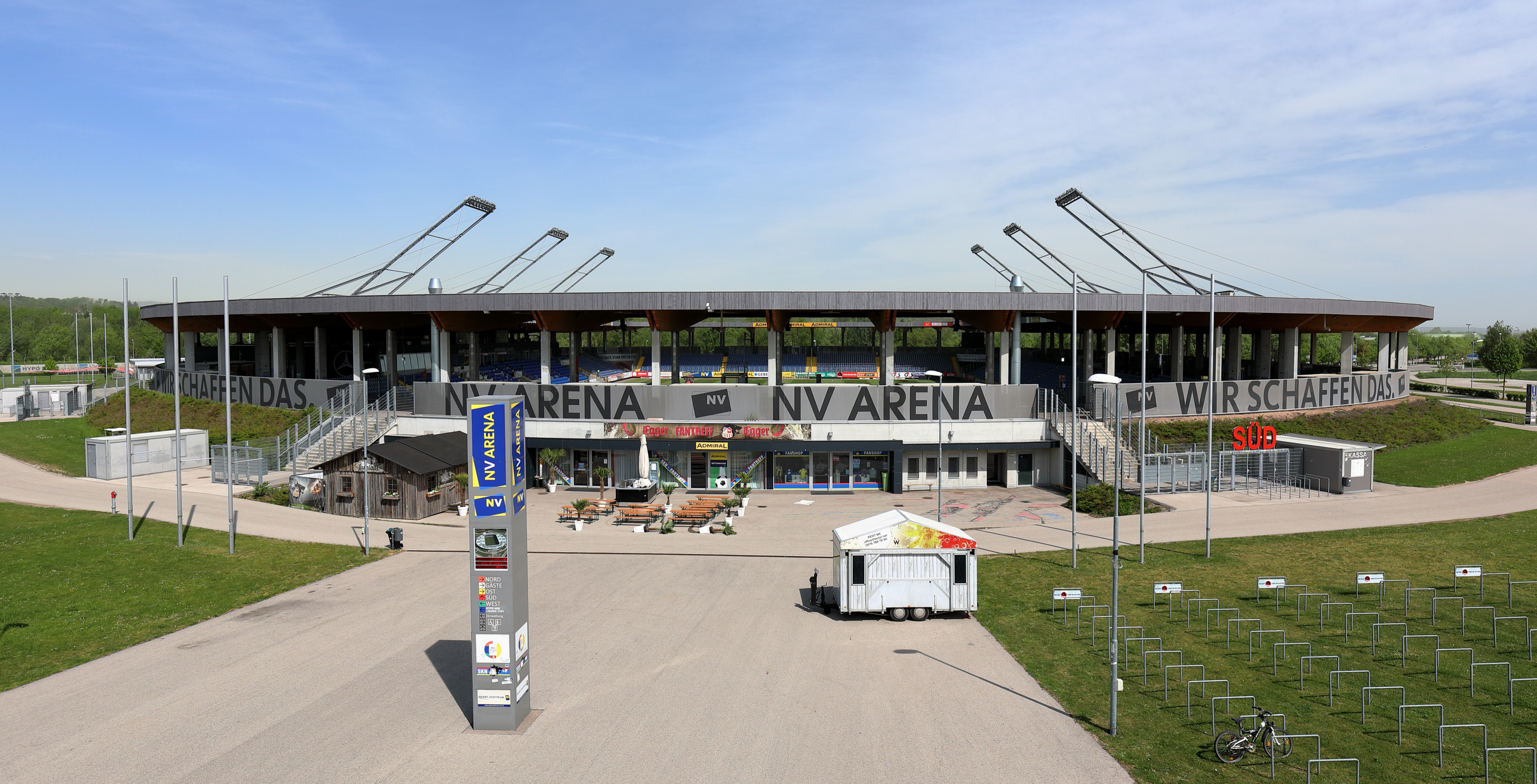 Das Fußballstadion „NV Arena“ (NV ist die Abkürzung des Sponsors Niederösterreichische Versicherung) in der niederösterreichischen Landeshauptstadt St. Pölten.Das im Juli 2012 eröffnete Station fasst 8.000 Zuschauer, wobei eine Erweiterungsmöglichkeit auf 13.000 Plätze besteht. Die Kosten von etwa 26 Mio. Euro, inklusive Infrastruktur und Grundstückskauf, teilten sich Land, Bund und die Stadt St. Pölten.